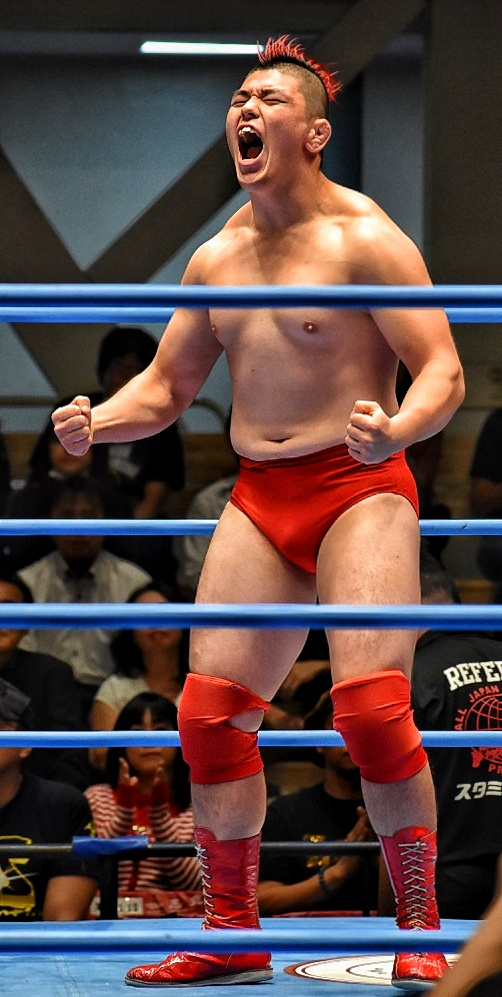 プロレスラーの田村男児